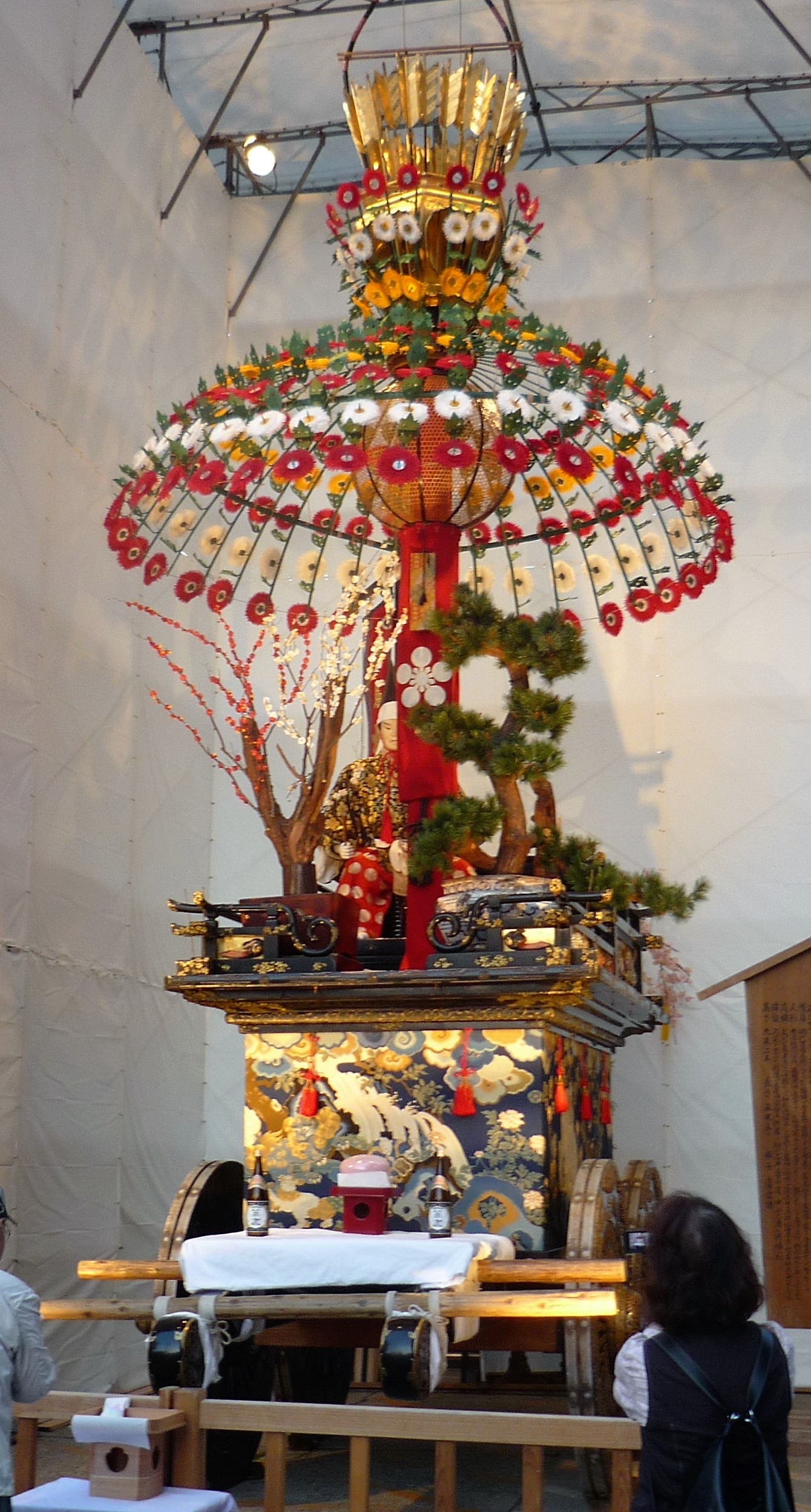 高岡市の御車山（御馬出町）（2015年4月）